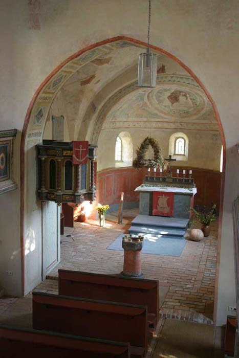 selbst fotografiert